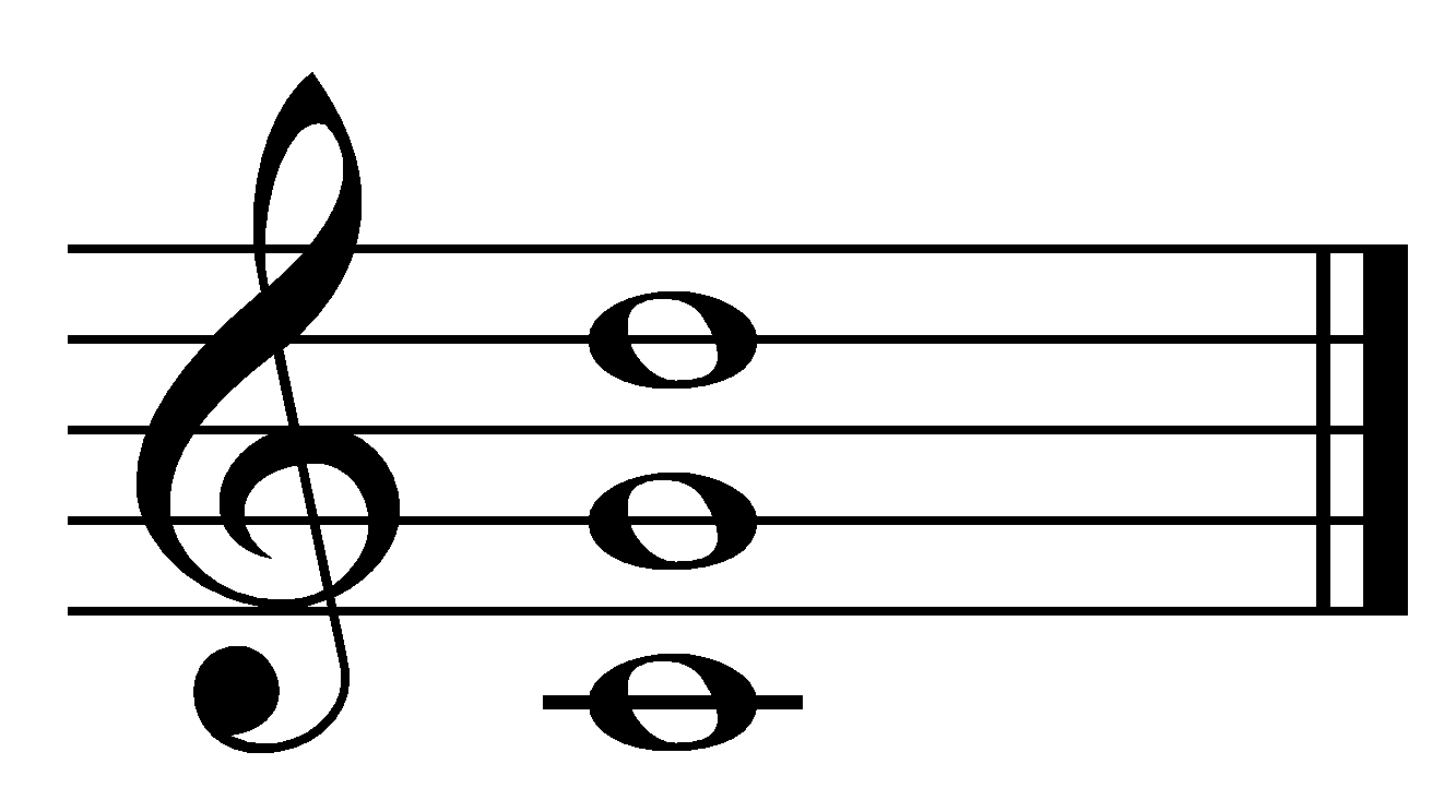 آکورد کوینتال روی نت دو